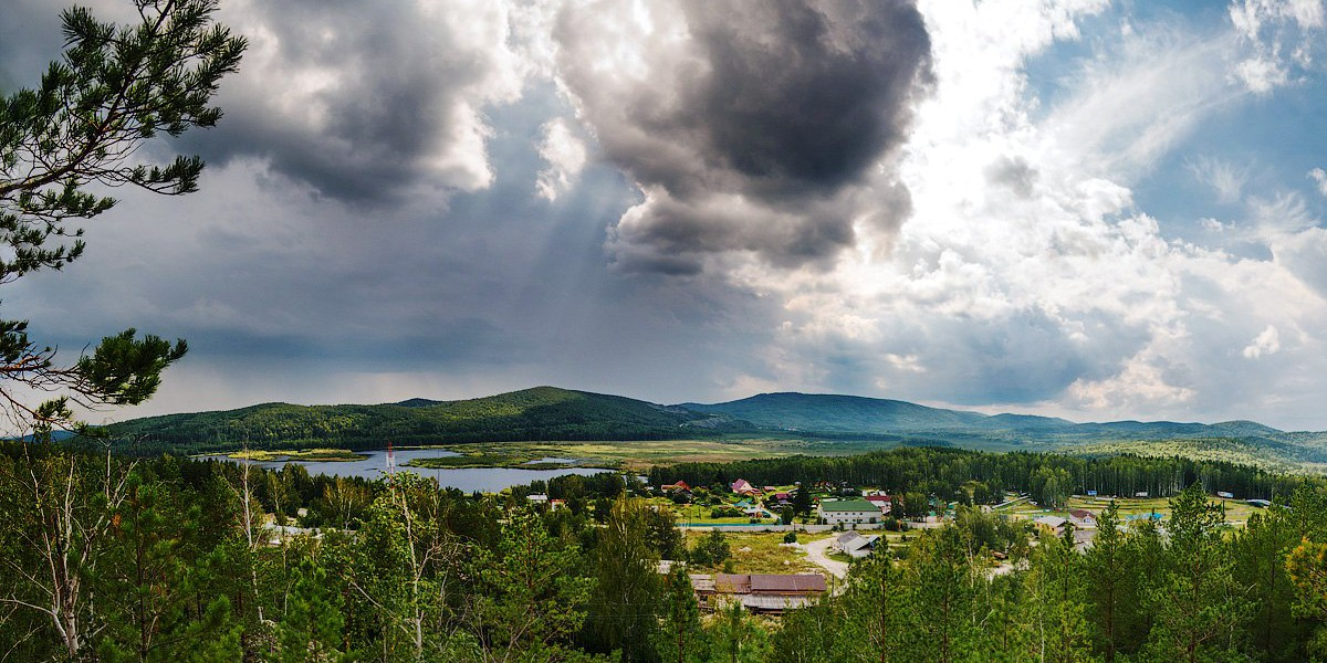 Посёлок